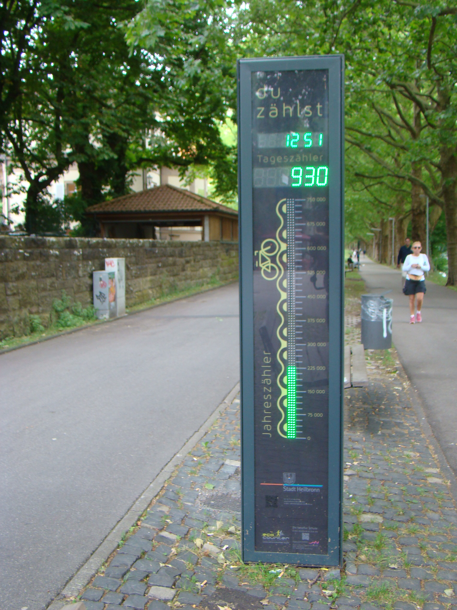 Fahrradzähler in Heilbronn